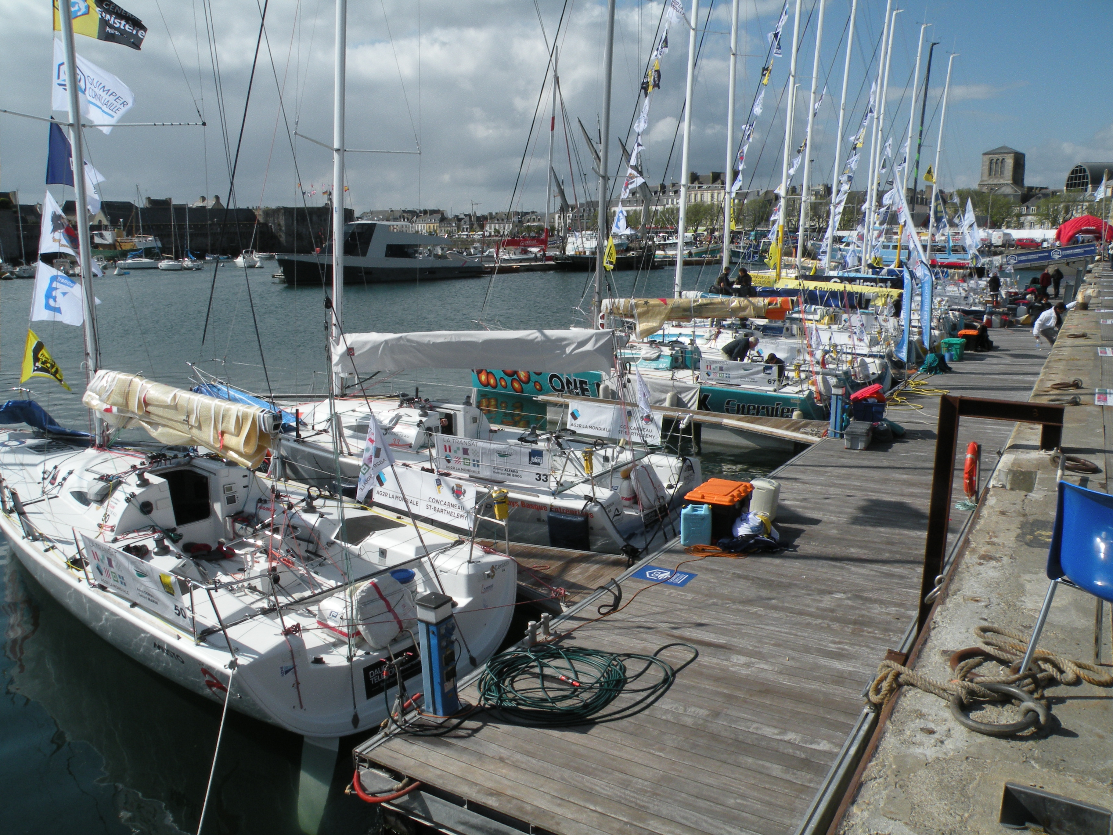 Transat AG2R 2012 à Concarneau : les quais le 15 avril 2012